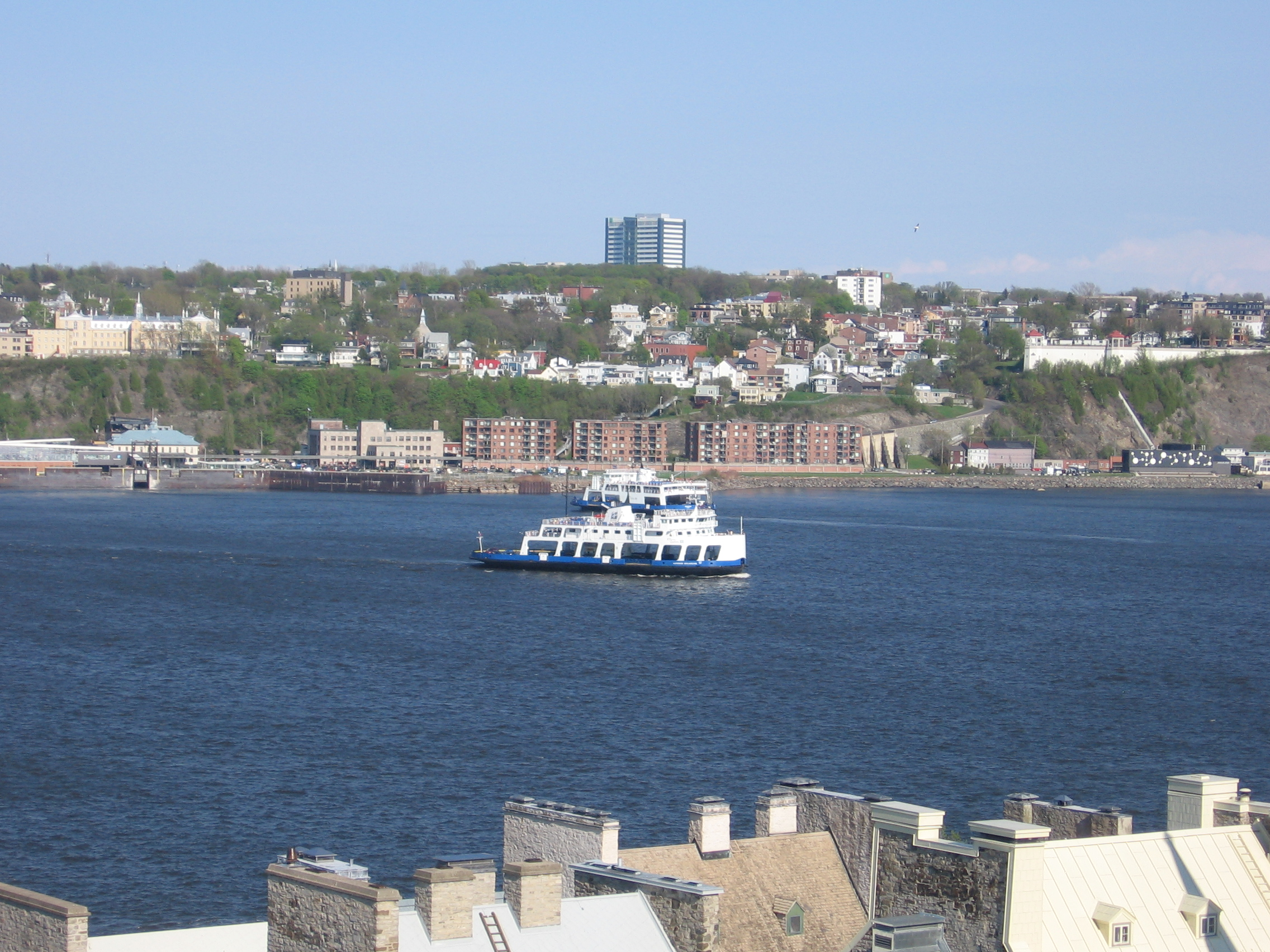 Lévis vu de Québec